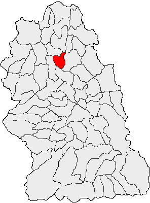 Categorie:Hărţi ale judeţului Hunedoara